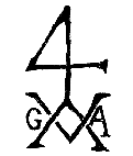 Un quatre de chiffre. cf